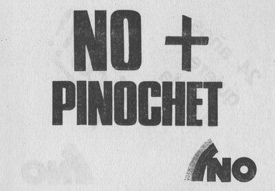 NO + PINOCHET. Panfleto contra Augusto Pinochet por el Plebiscito Nacional de 1988 (Chile).